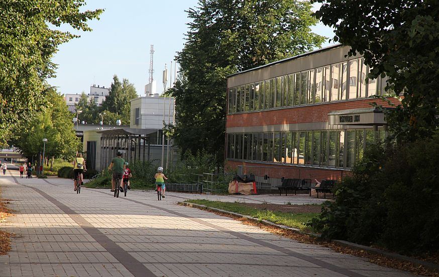 Myyrmäenraittia Vantaan Myyrmäessä. Kuvassa etuoikealla Vaskivuoren lukion rakennus, taaempana Myyrmäen urheilutalo. Huom: Muista säilyttää viittaus kuvaajaan, mikäli käytät kuvaa.